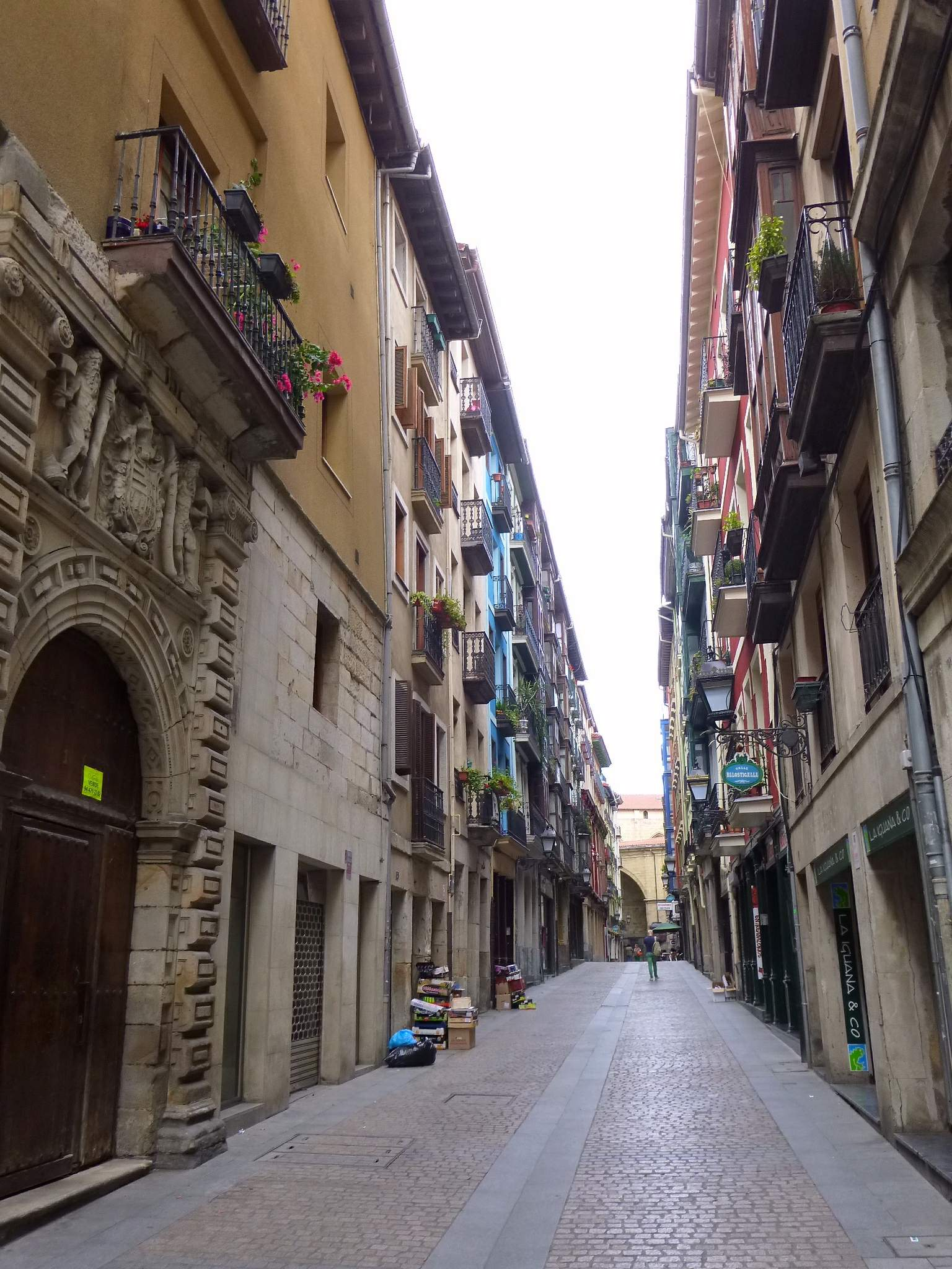 Belostikale, una de las Siete Calles del Casco Viejo de Bilbao